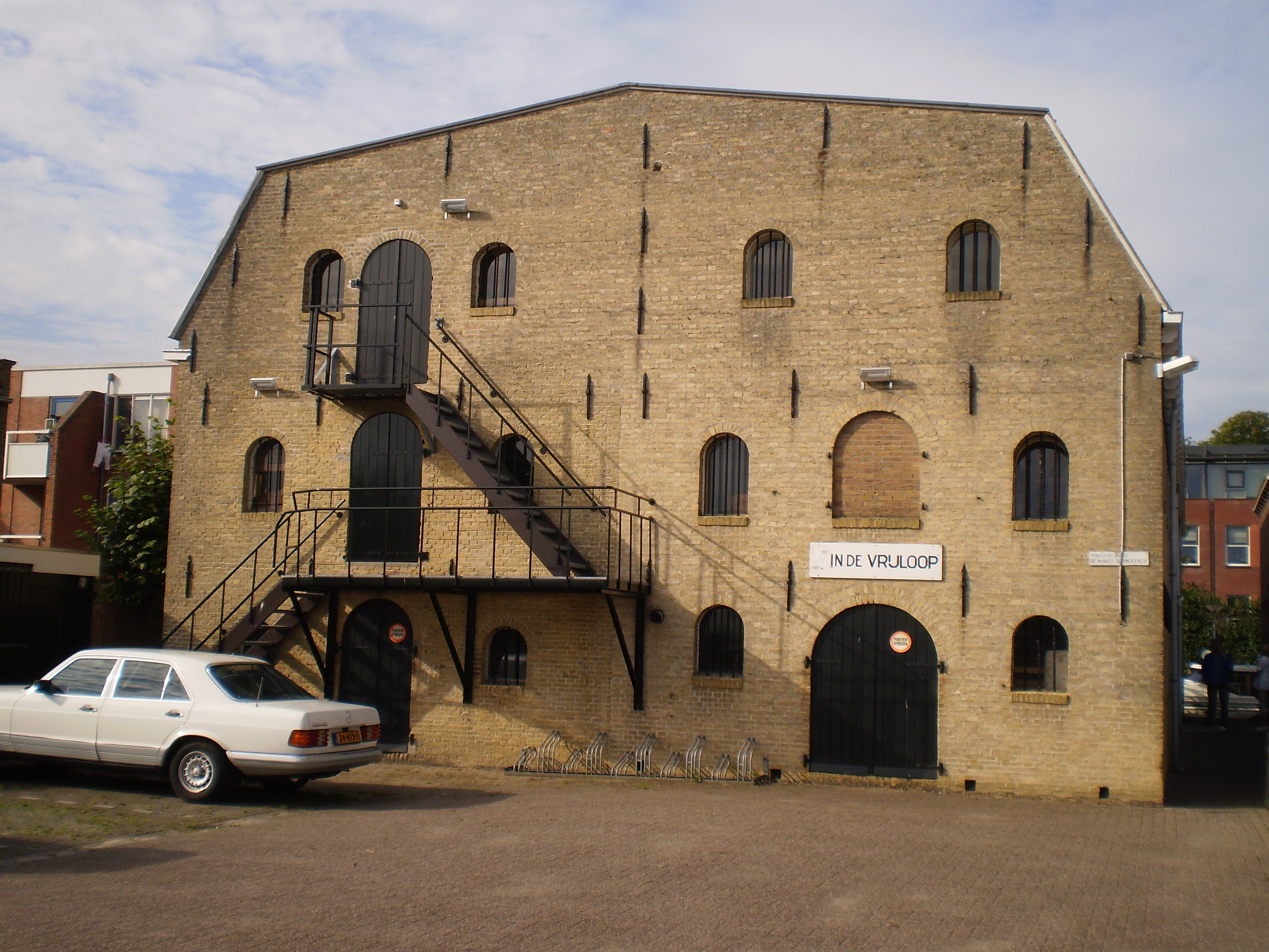 Ofbyld oanbean troch Swarte Kees op 30 july 2009